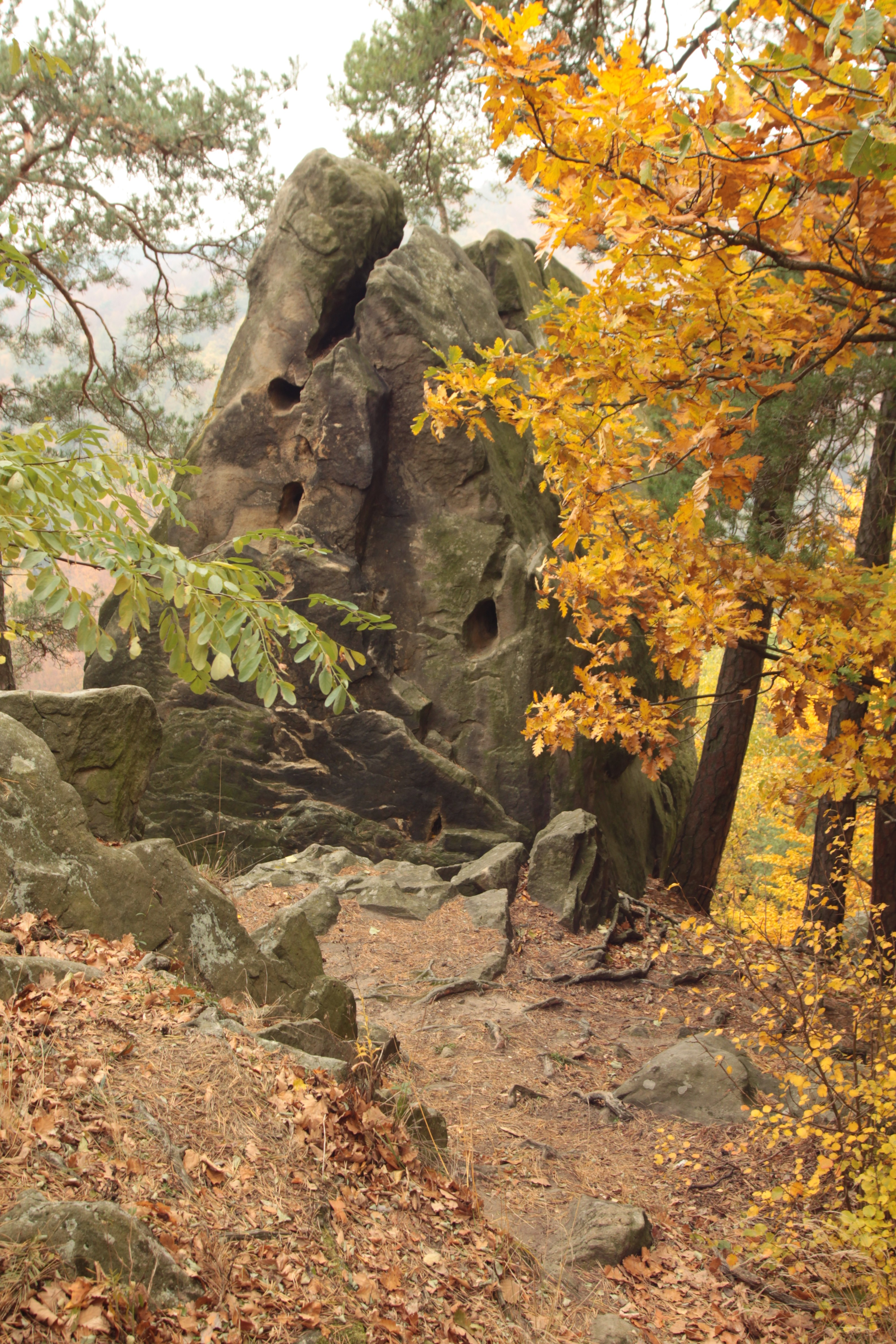 Podzimní krajina PP Břestecká skála